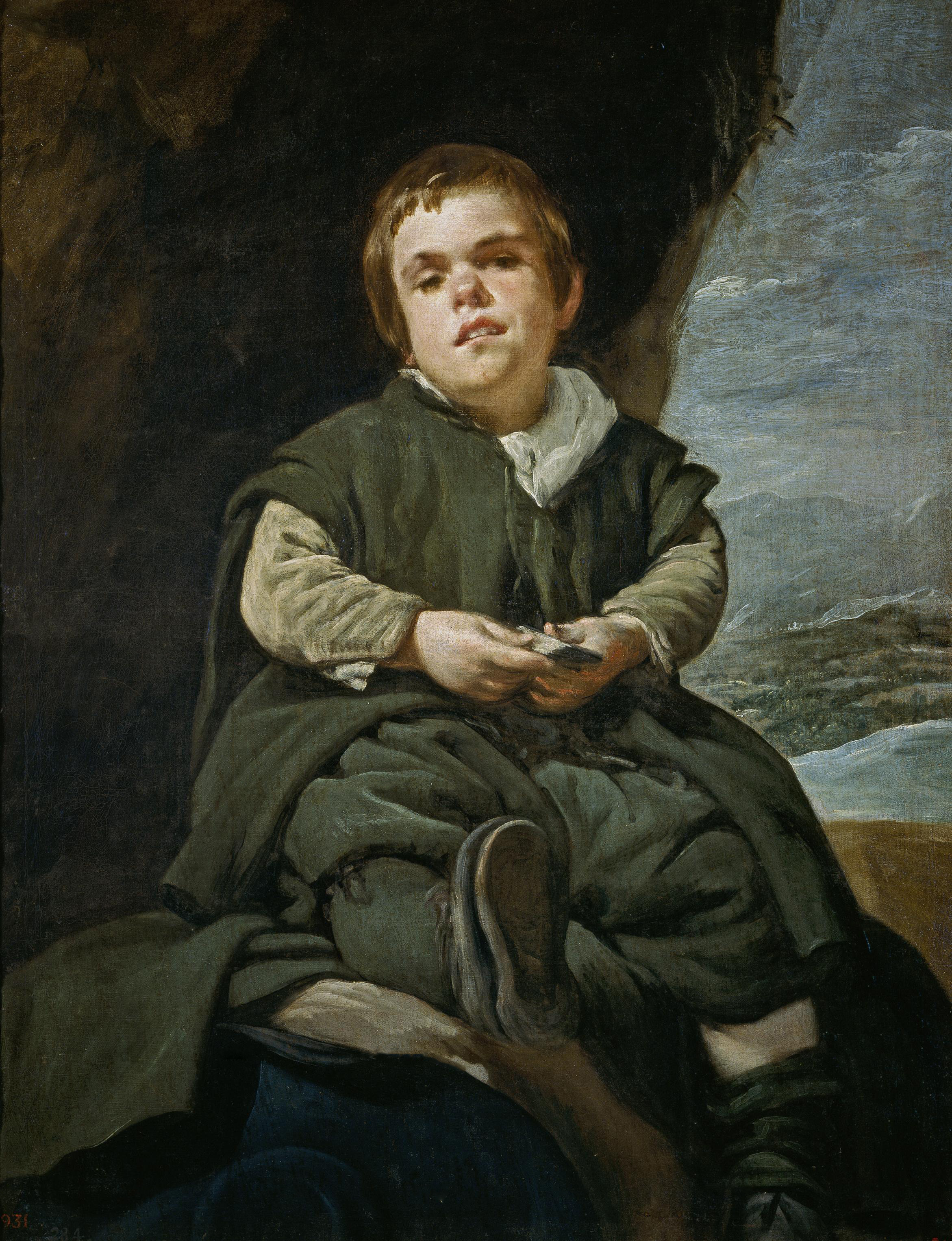 Retrato del bufón español Francisco Lezcano, que fue apodado El niño de Vallecas.